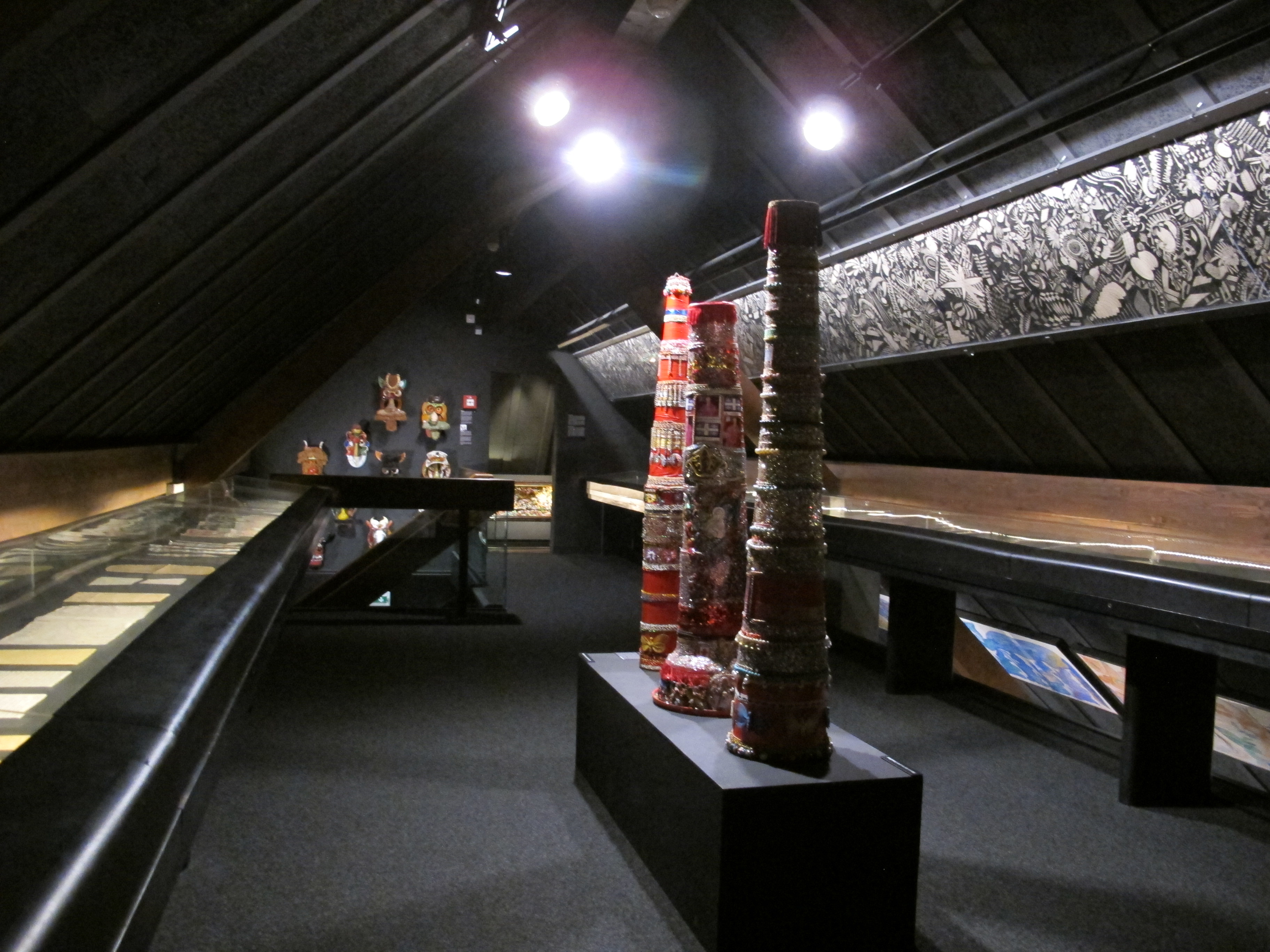 Losanna, Svizzera